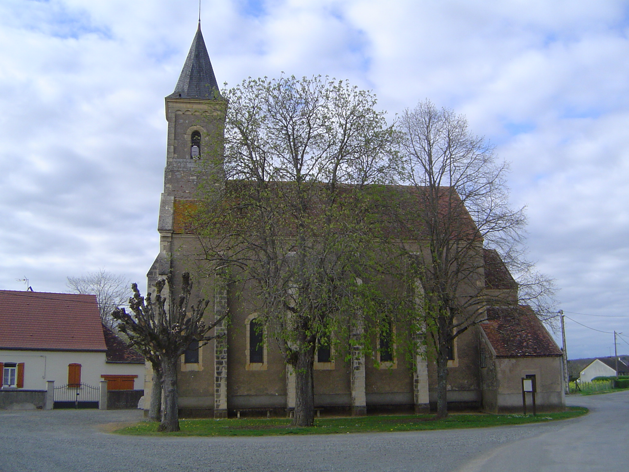 Saint-Hilaire-Fontaine (église 5)